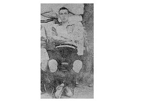 Green en 1903